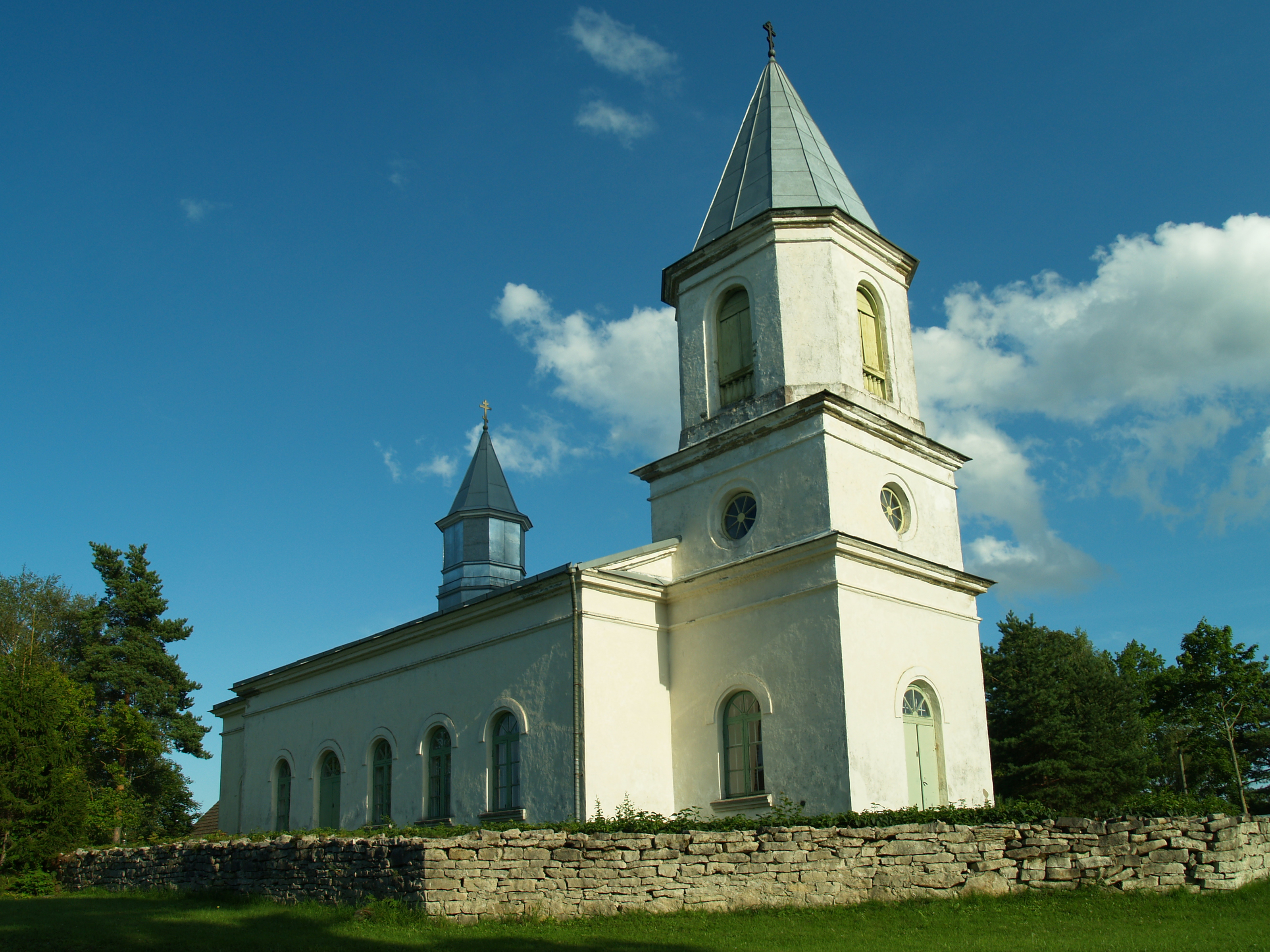 Hellamaa õigeusu kirik Muhu saarel.